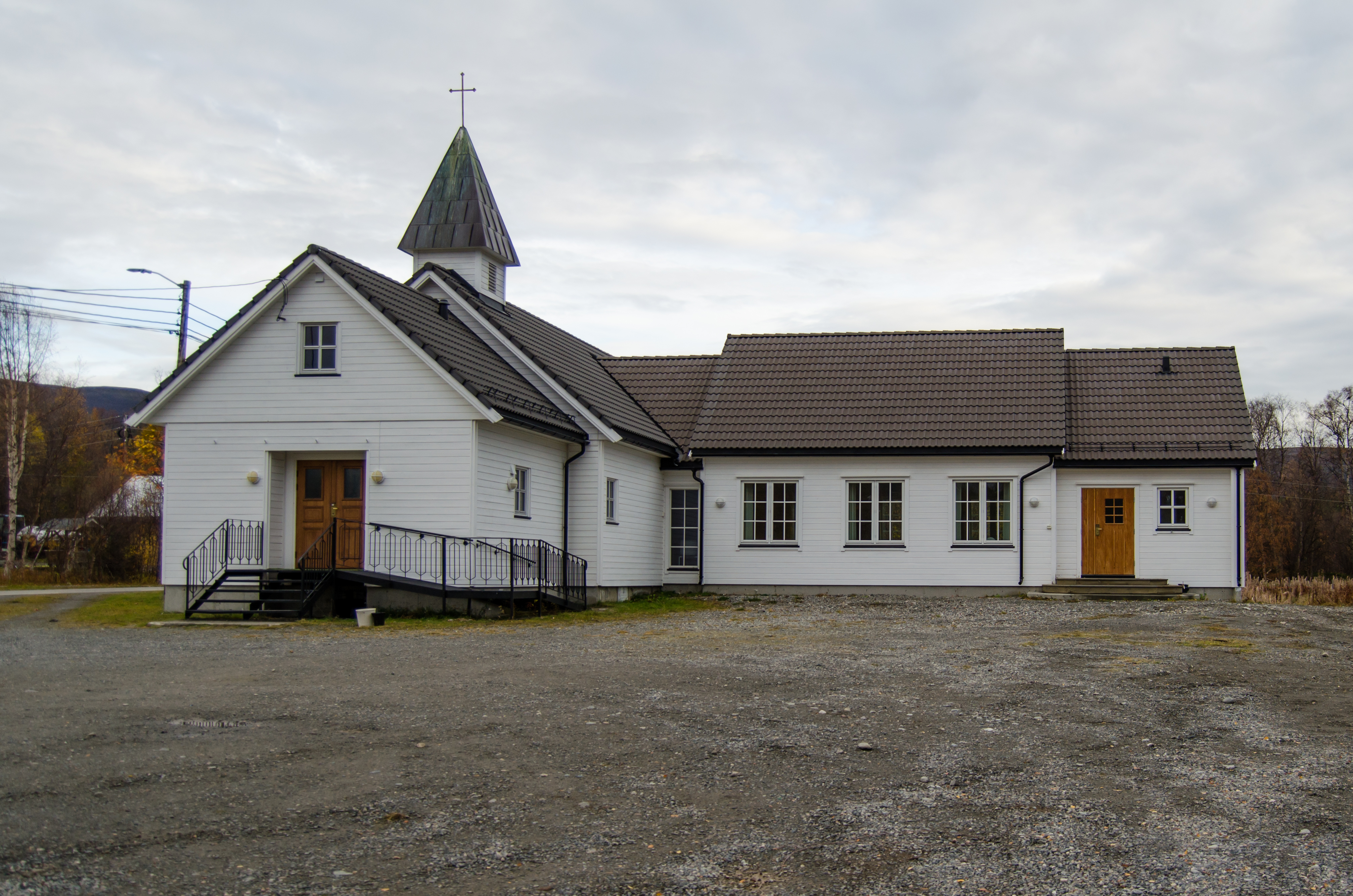 Rafsbotn kapell